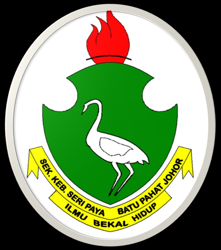 Sekolah Kebangsaan Seri Paya